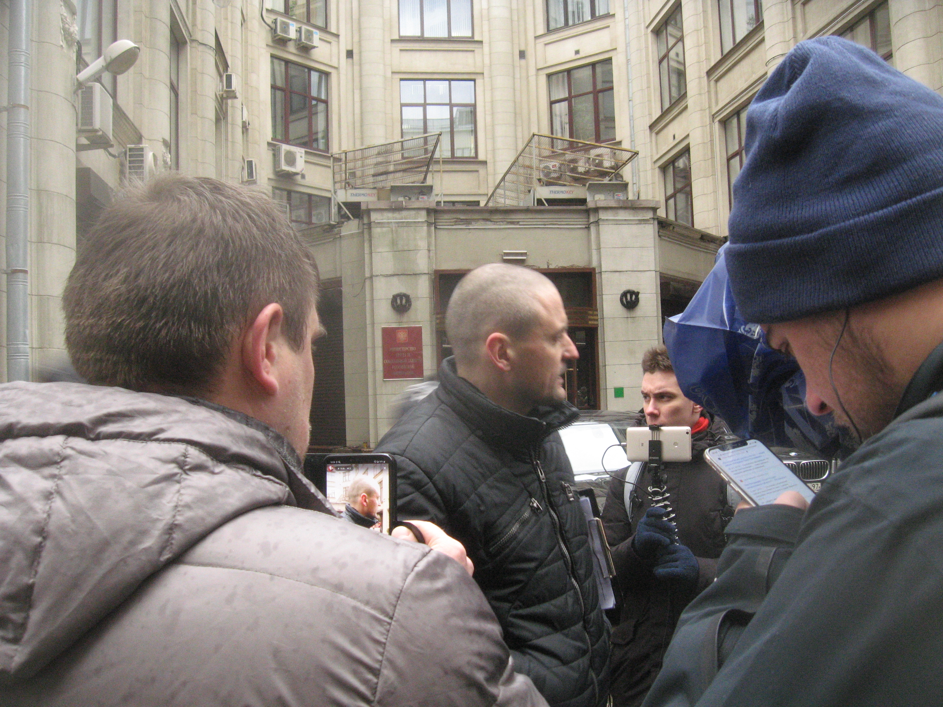 Акция Левого Фронта, Партии Дела, «Другой России», движения «Новороссия», Объединения перевозчиков России, ОКП, РОС, «Гражданской солидарности» и др. организаций и граждан - требование провести референдум по вопросу внесения поправок в Конституцию РФ